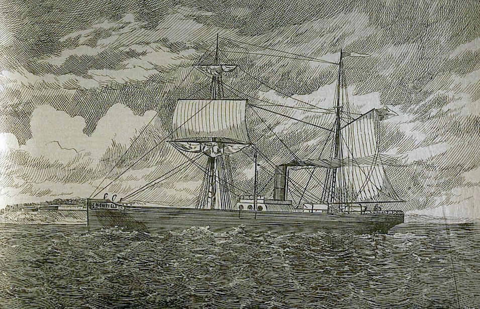 Le vapeur Niewfield propriété du gouvernement fédéral Canada